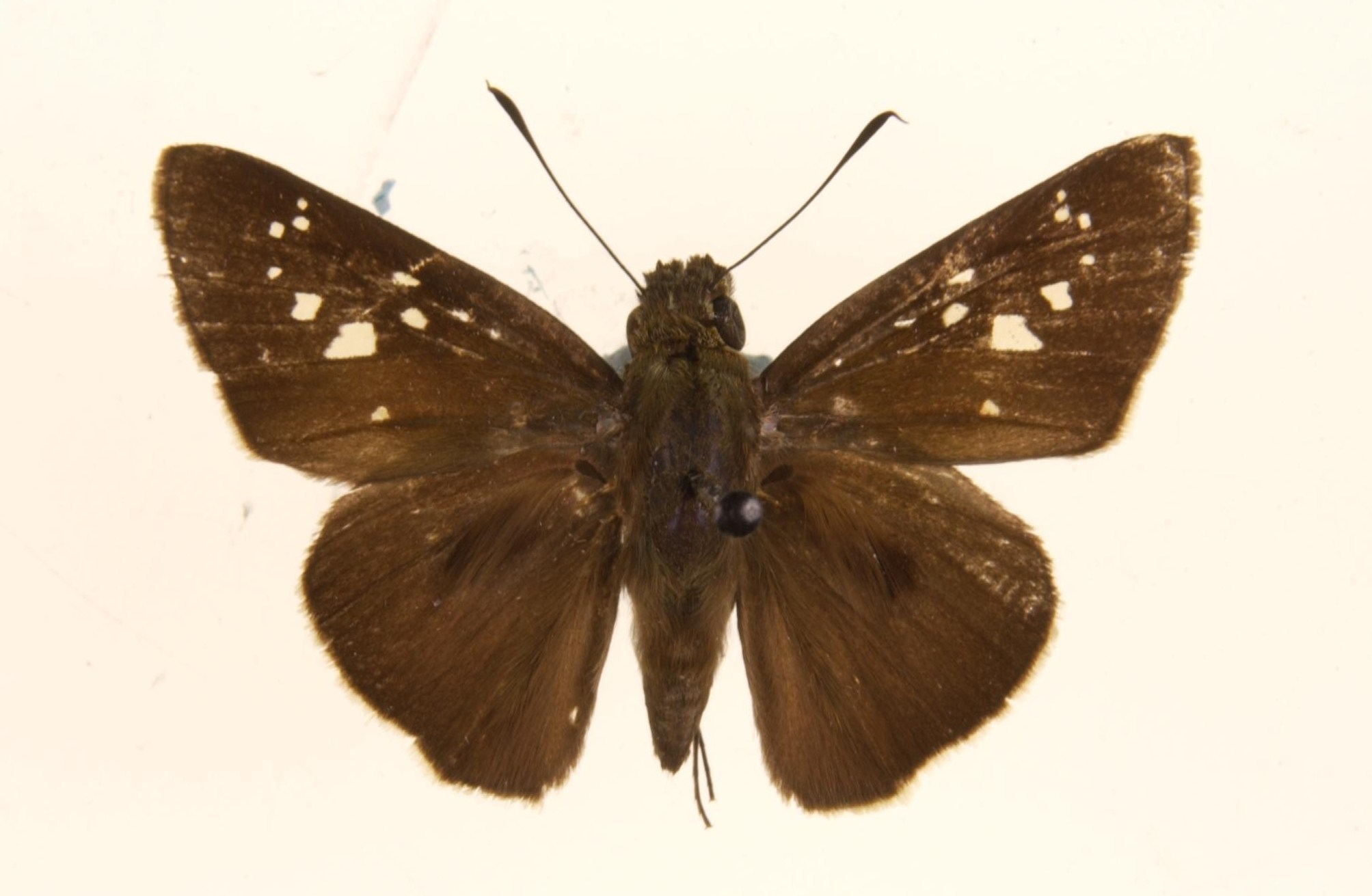 Baoris farri